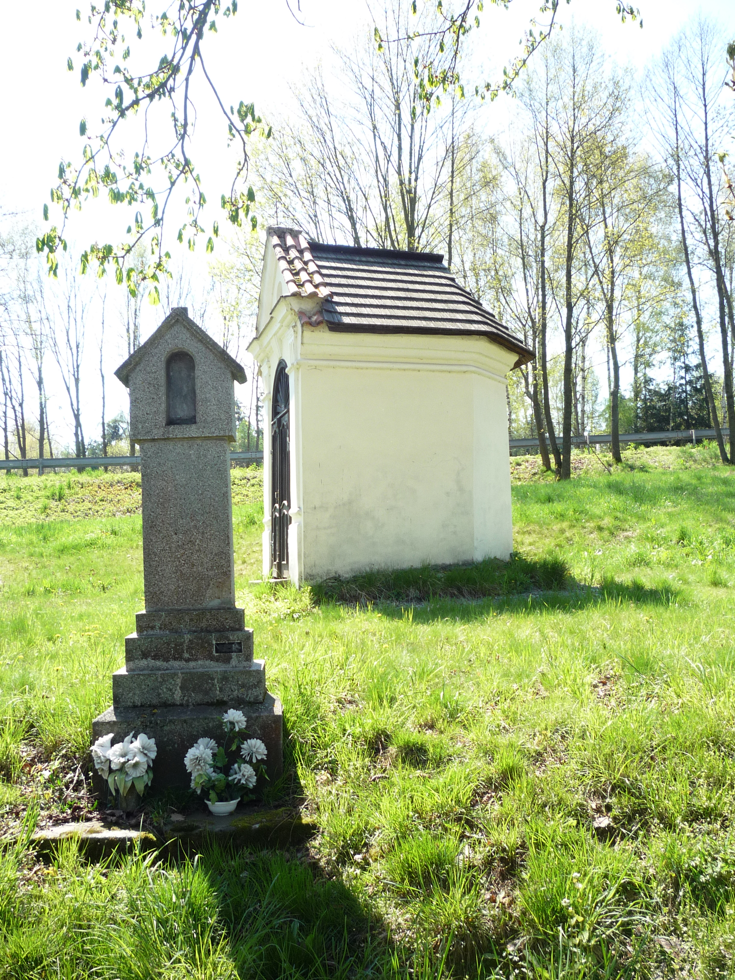 Autor fotografie Jiří Zelenka. Toulky Vysočinou. Cestou krajem básníka a malíře Jana Zrzavého. Obec Okrouhlice. Okr. Havlíčkův Brod.